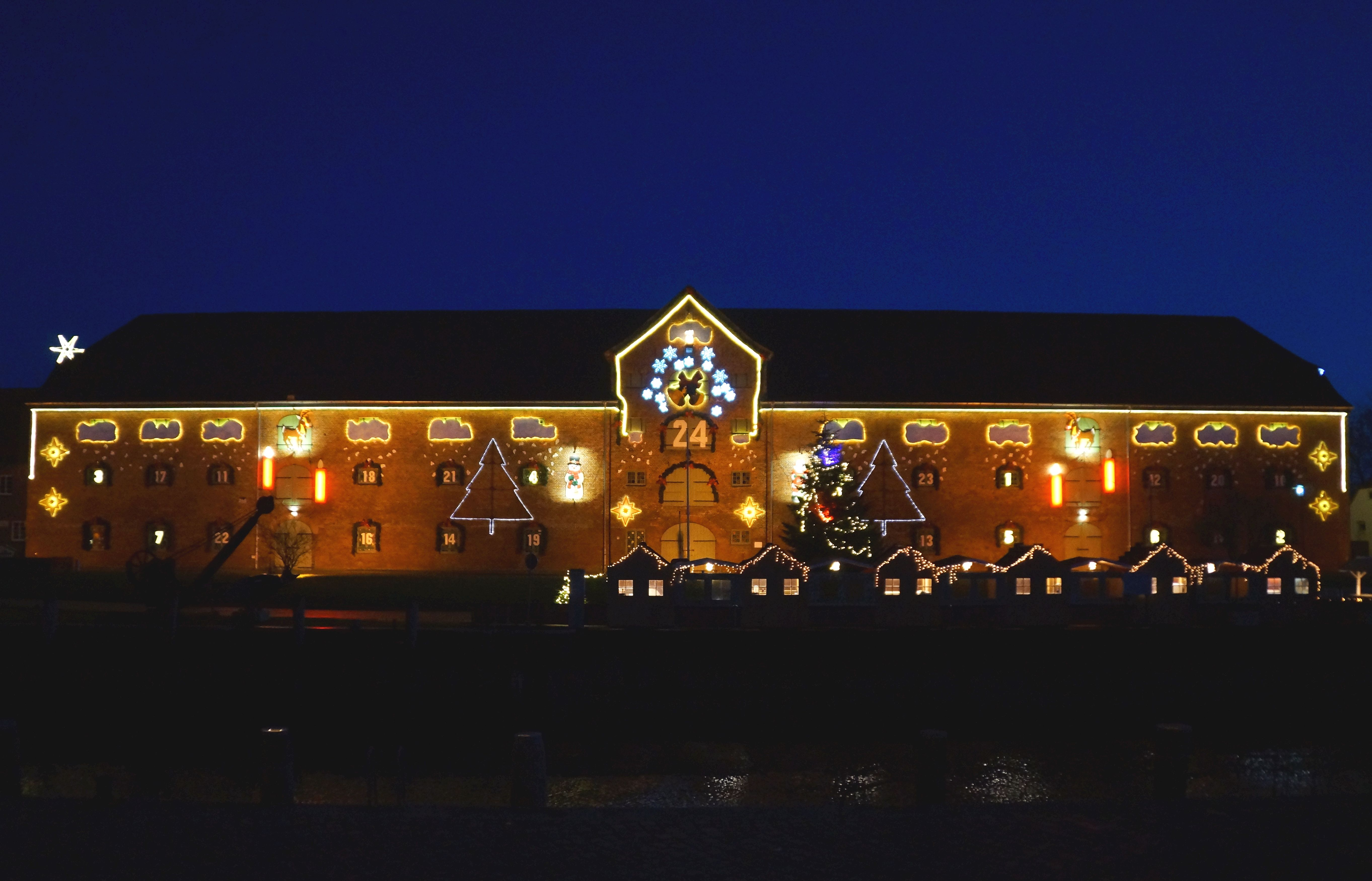 Der (vermutlich längste) Adventskalender (der Welt) am Alten Packhaus am Eider-Hafen von Tönning in Nordfriesland, Schleswig-Holstein, Deutschland.